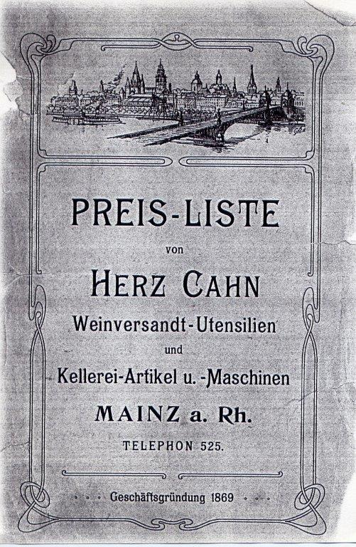 לוגו עסק